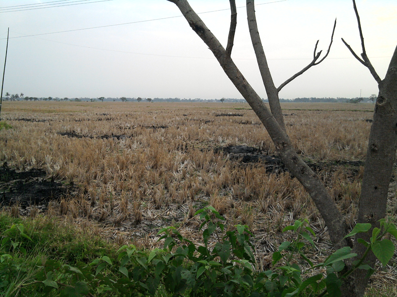 Madrasah Alkhairiyah Panecekan